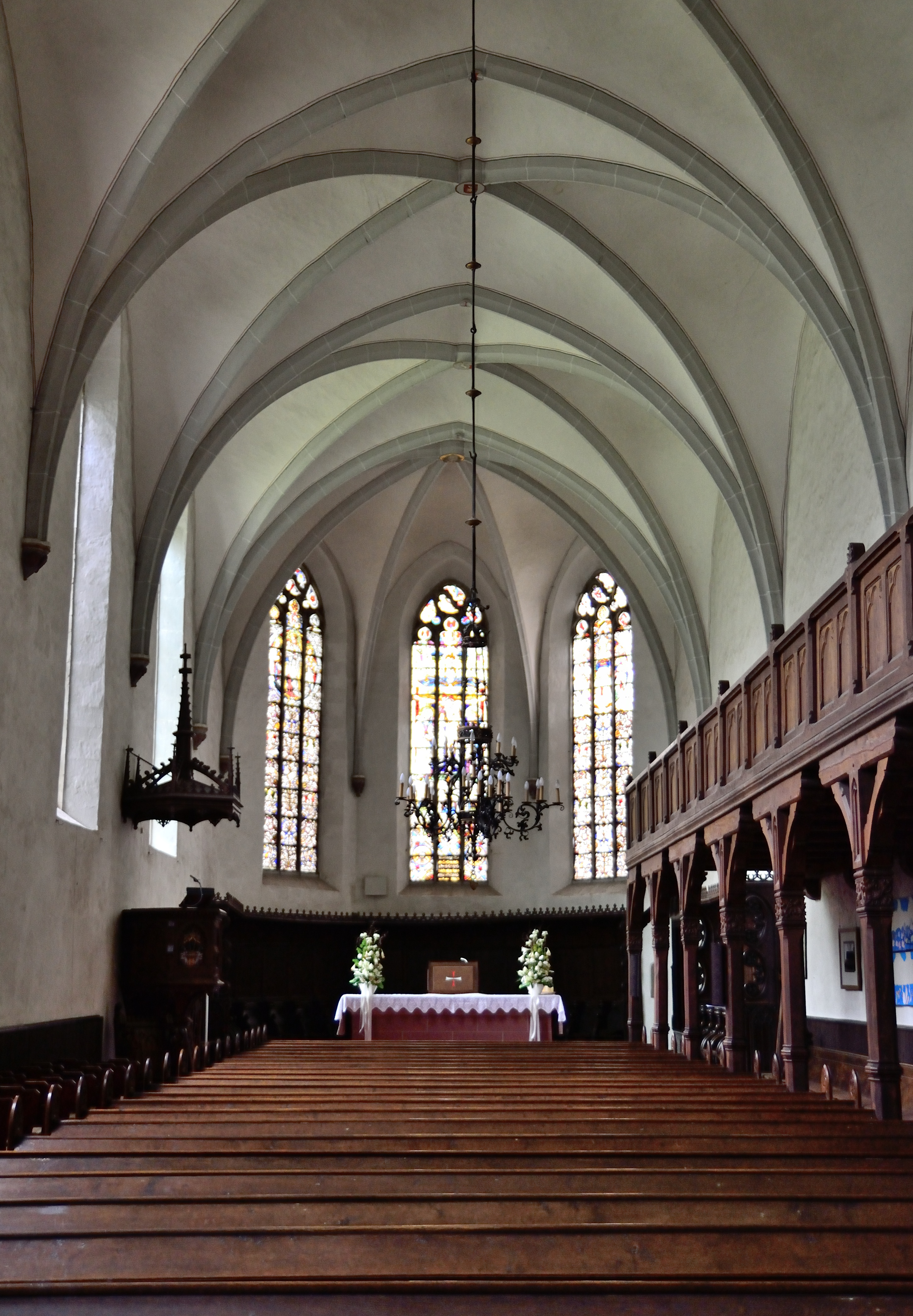 Inneres der evangelisch-reformierten Klosterkirche Falkenhagen, Blickrichtung Osten